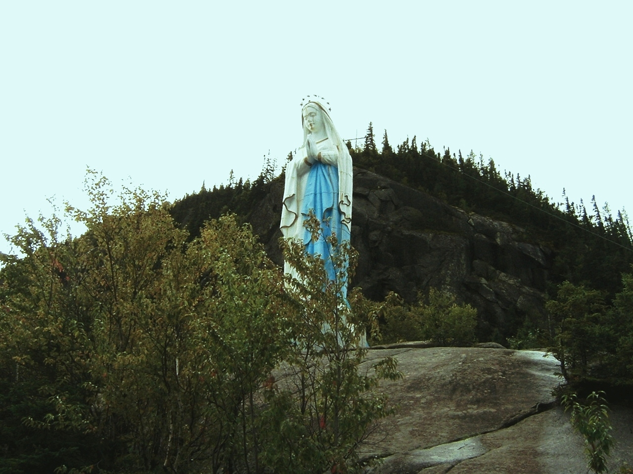 Statue de Notre-Dame-du-Saguenay vue de sa base, sur le Cap Trinité; photo prise par François Lambert en septembre 2004